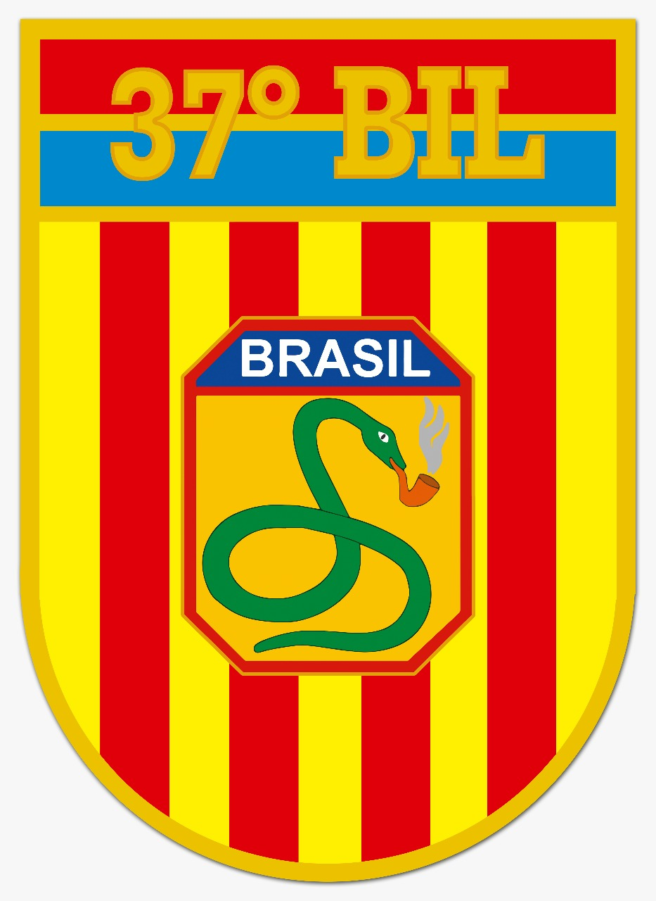 Novo distintivo histórico do 37 Batalhão de Infantaria Leve do Exército Brasileiro, disponível em Portaria Nr 857, de 11 de junho de 2018, publicada no Boletim do Exército Nr 25 de 21 de junho de 2018